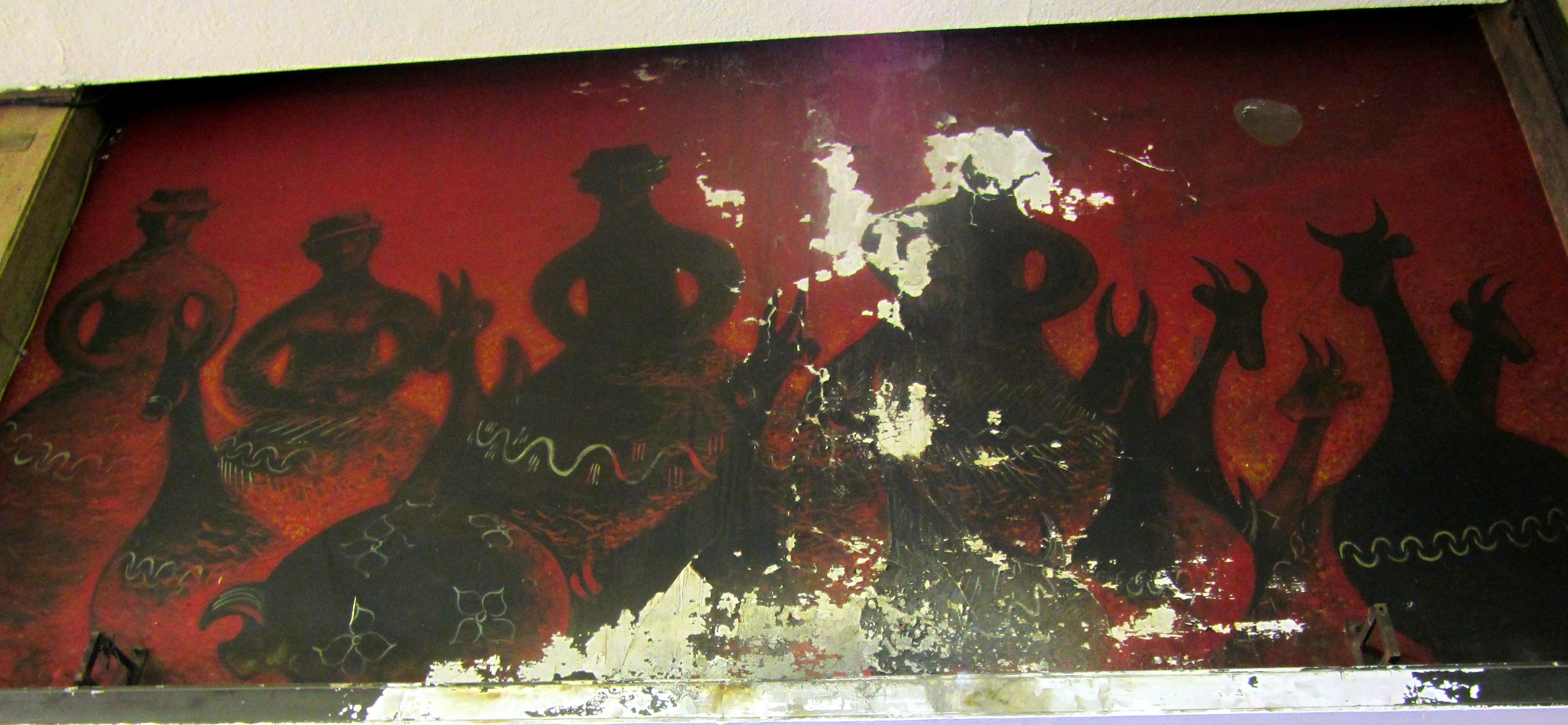 Mural Quinchamalí de Nemesio Antúnez; Galería Juan Esteban Montero (une las calles Huérfanos con San Antonio en Santiago de Chile); foto de abril de 2013